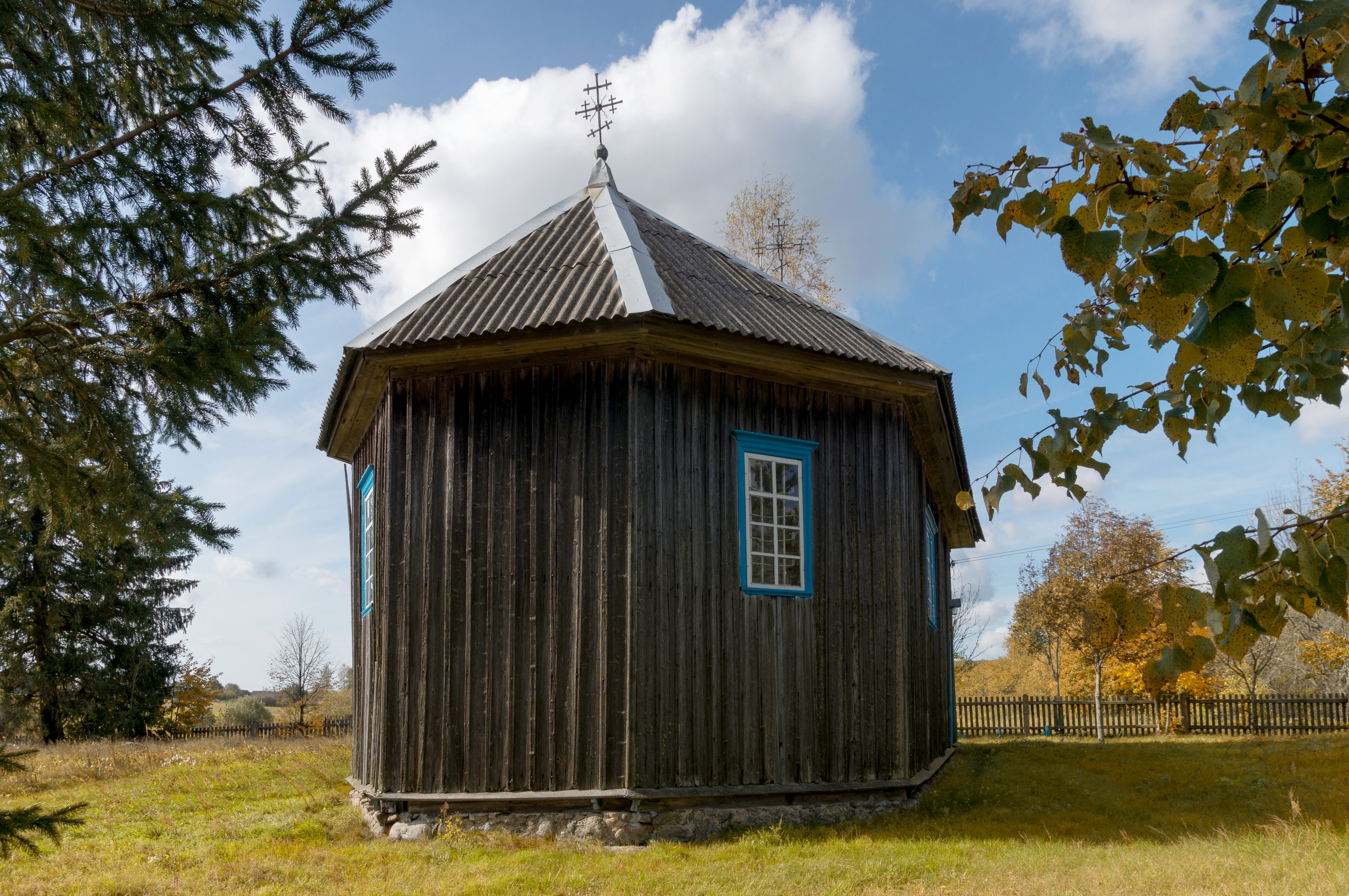 Від з боку апсіды